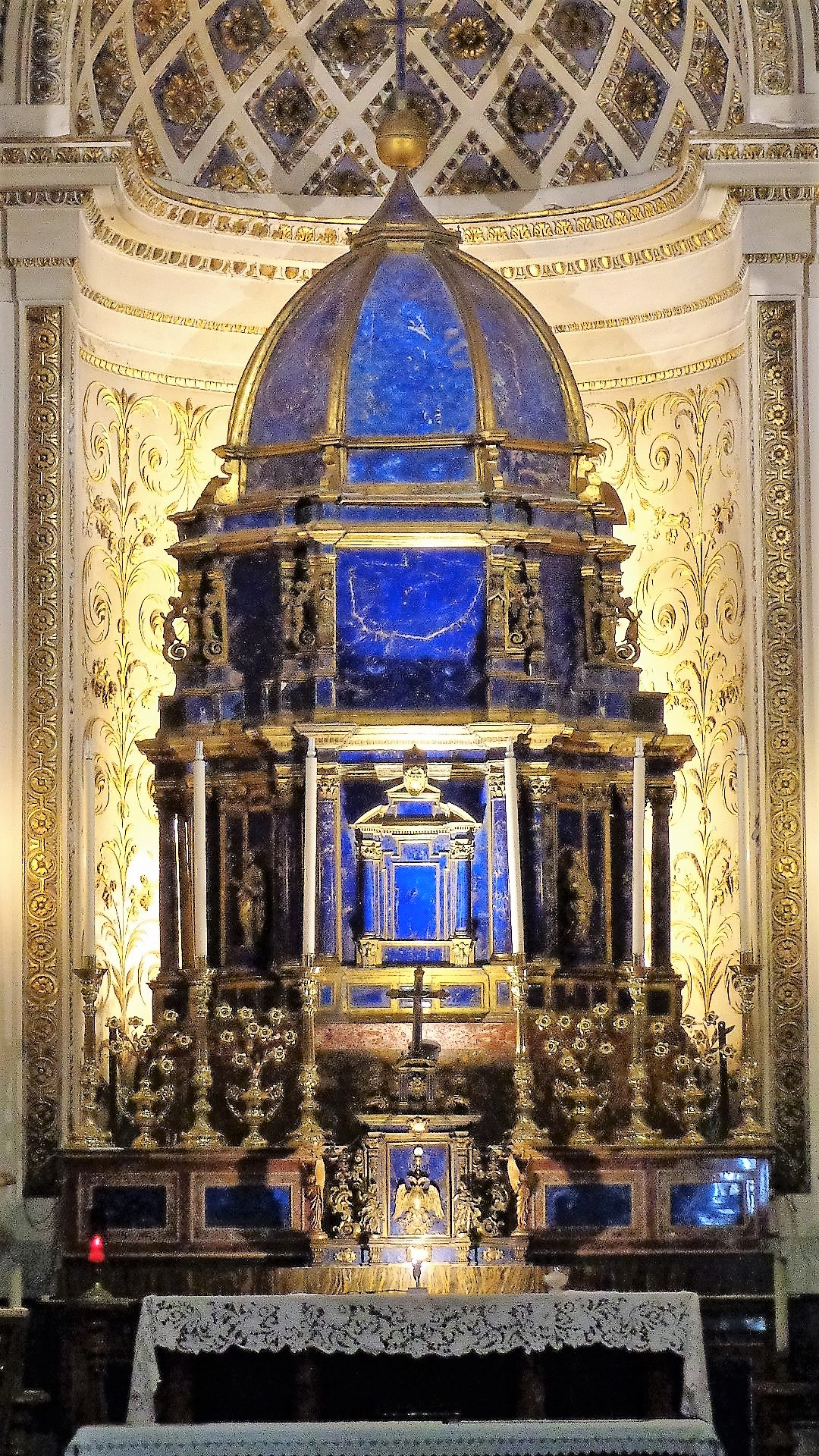 Altare Santissimo Sacramento